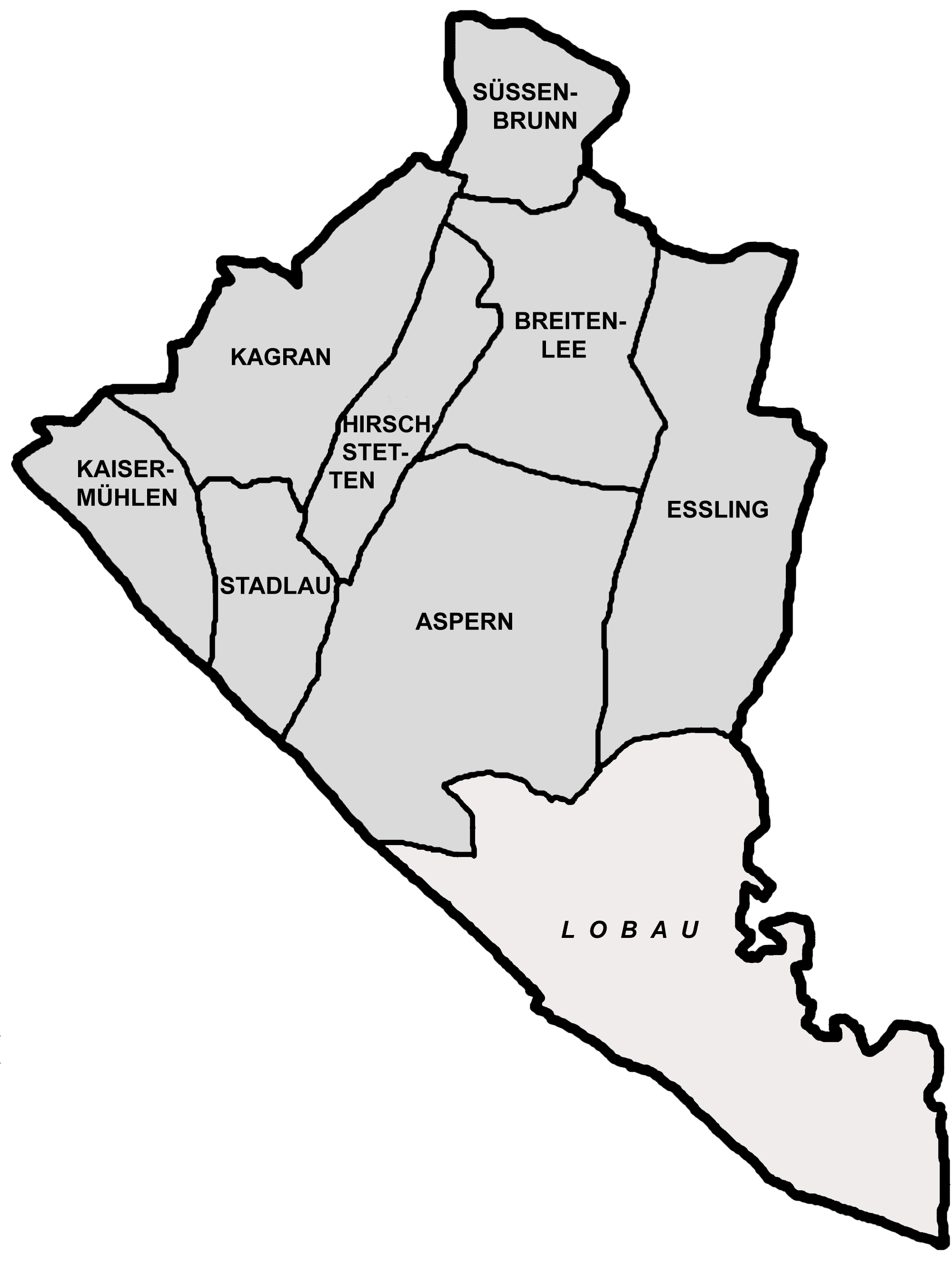 Karte der Bezirksteile des Gemeindebezirks Donaustadt in Wien